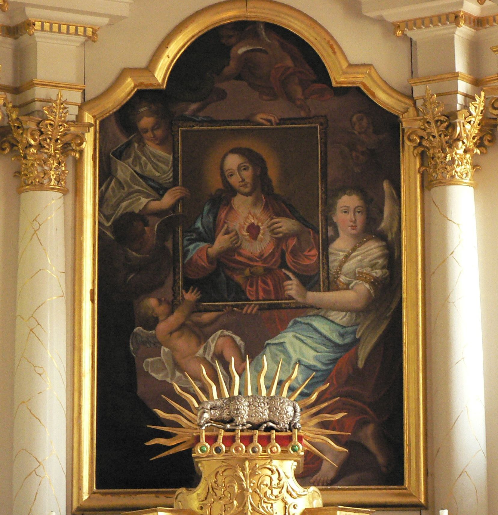 Herz-Jesu-Altar in Velburg, Bavaria